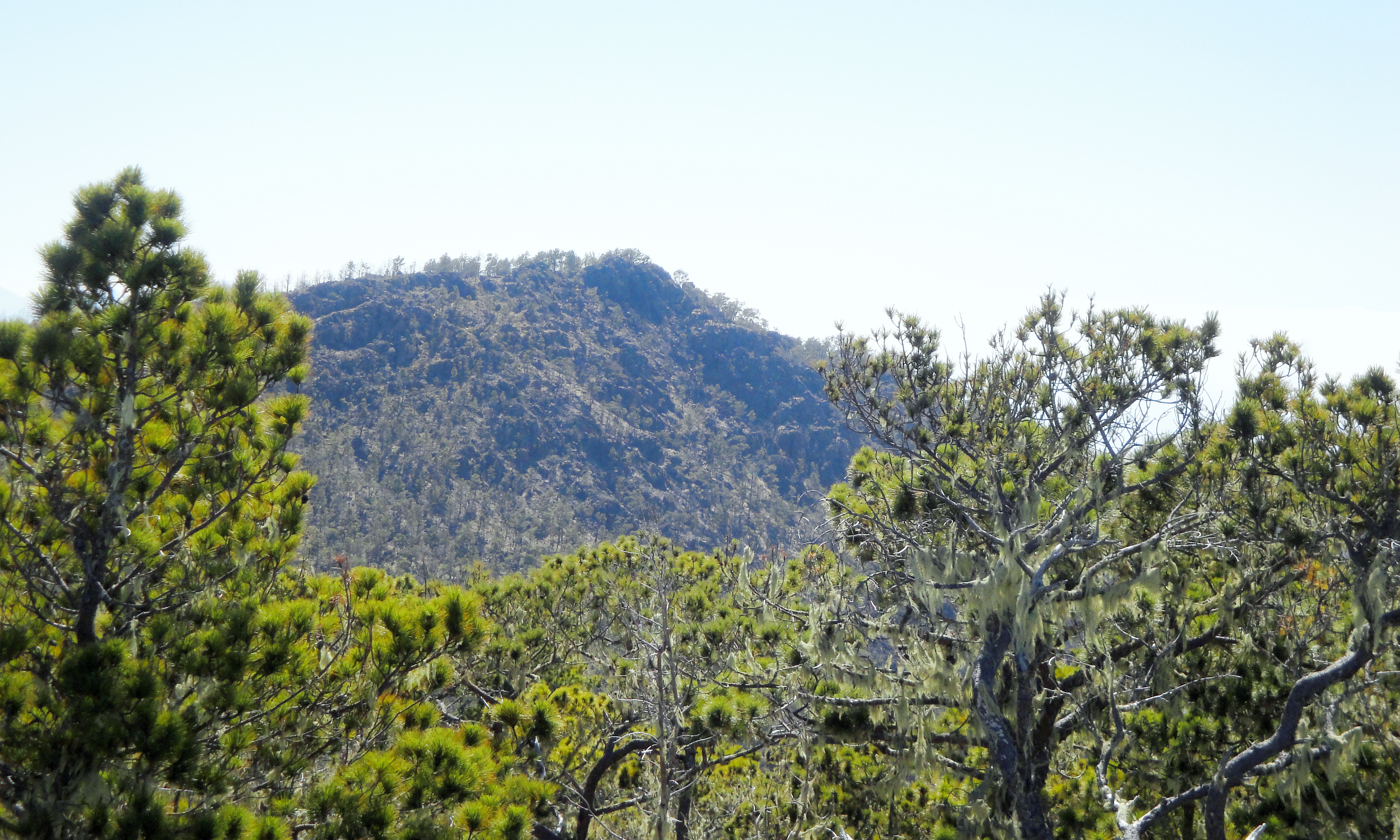 Pinus occidentalis, Pico Duarte, Desde La Pelona, Dominican Republic.